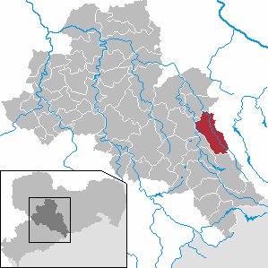 Bobritzsch-Hilbersdorf im Landkreis Mittelsachsen, Sachsen